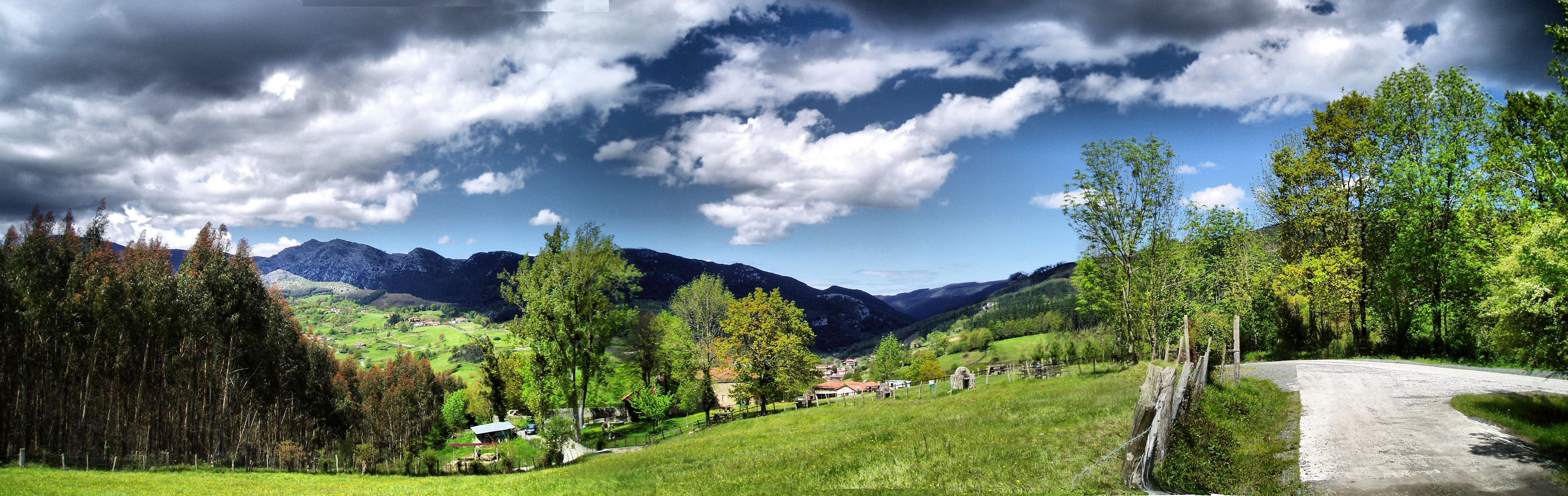 Bizkaiko Turtziozko San Roke auzoa.